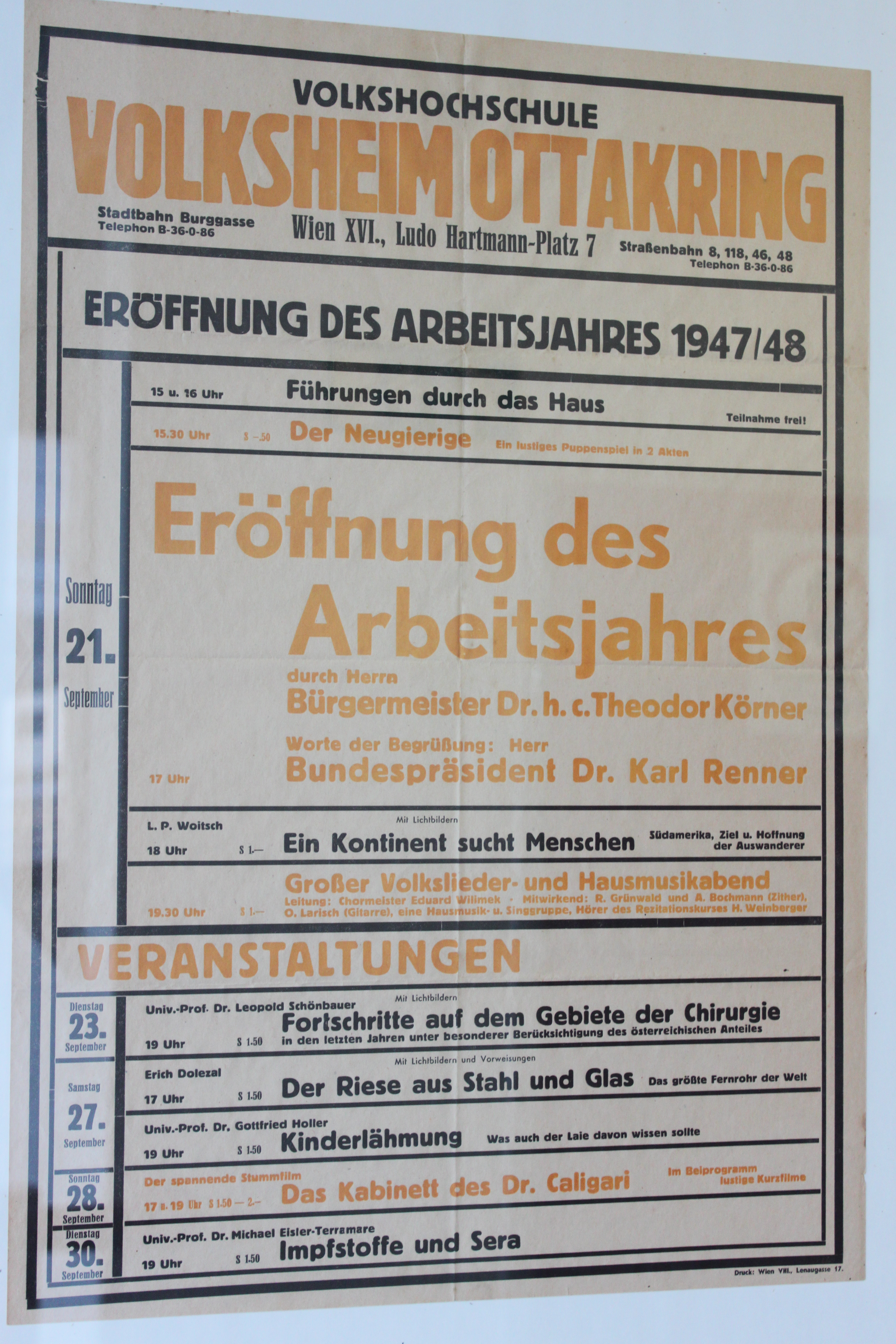 Plakat Volkshochschule Volksheim Ottakring 1947